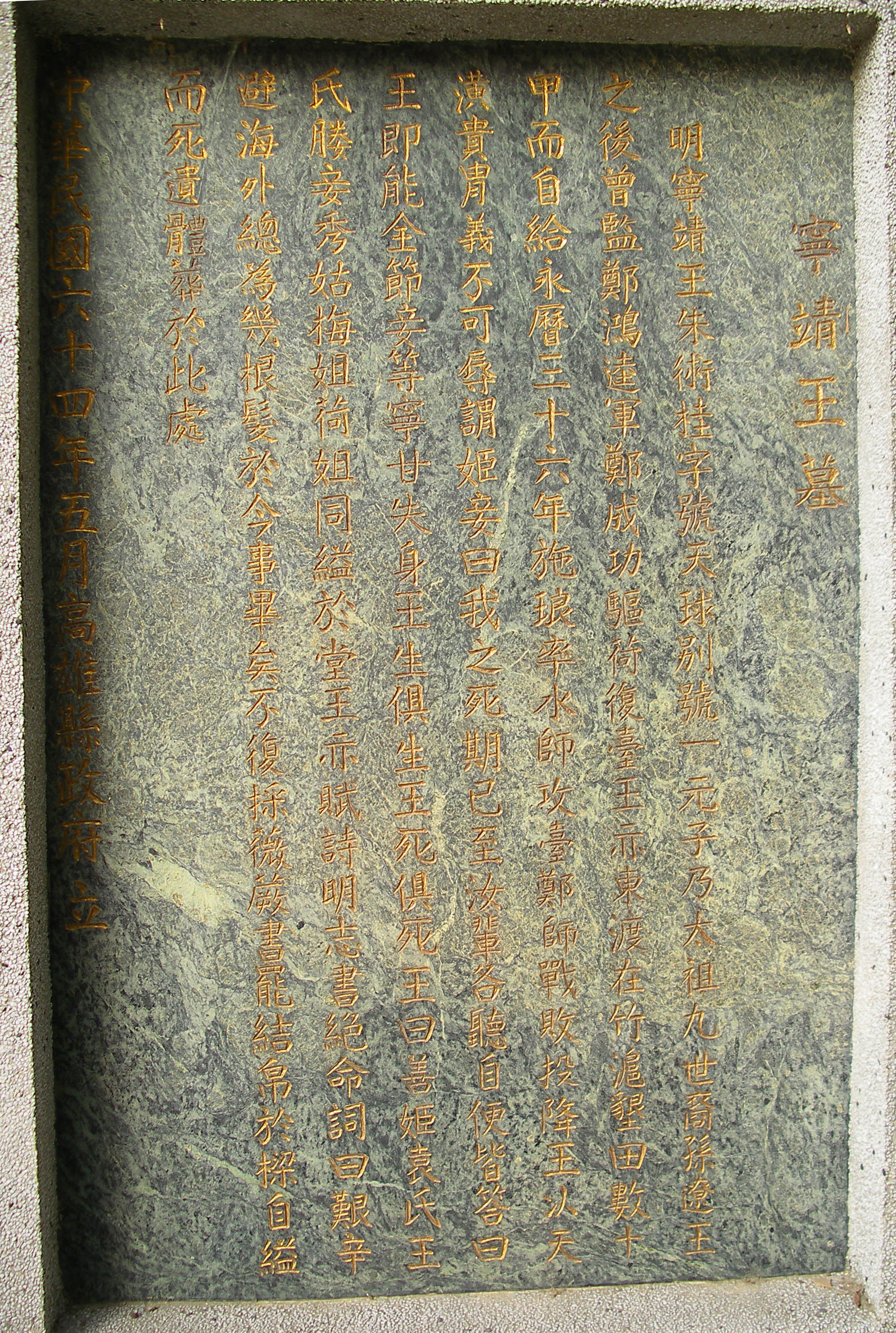 中文（台灣）: 高雄縣政府於1965年5月在寧靖王墓旁所立的碑文。